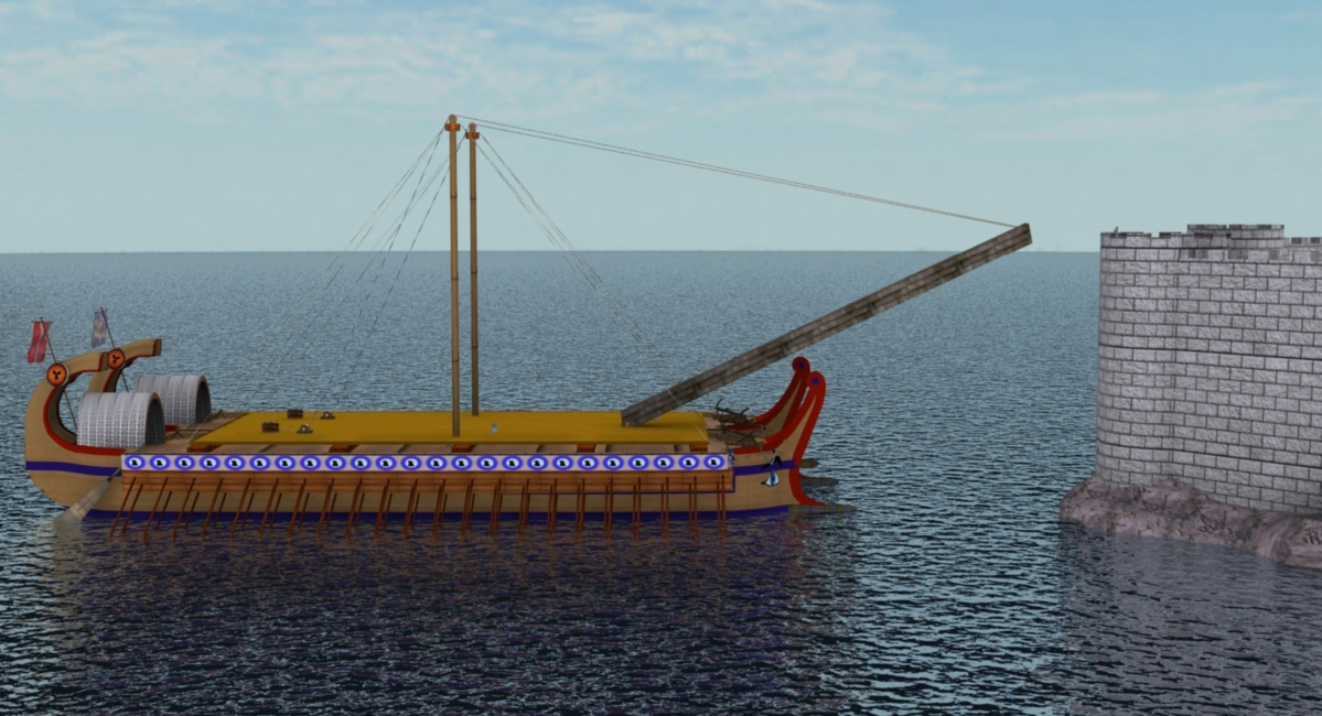 sono l'autore, sono l'autore, sambuca ellenistica,pubblico dominio